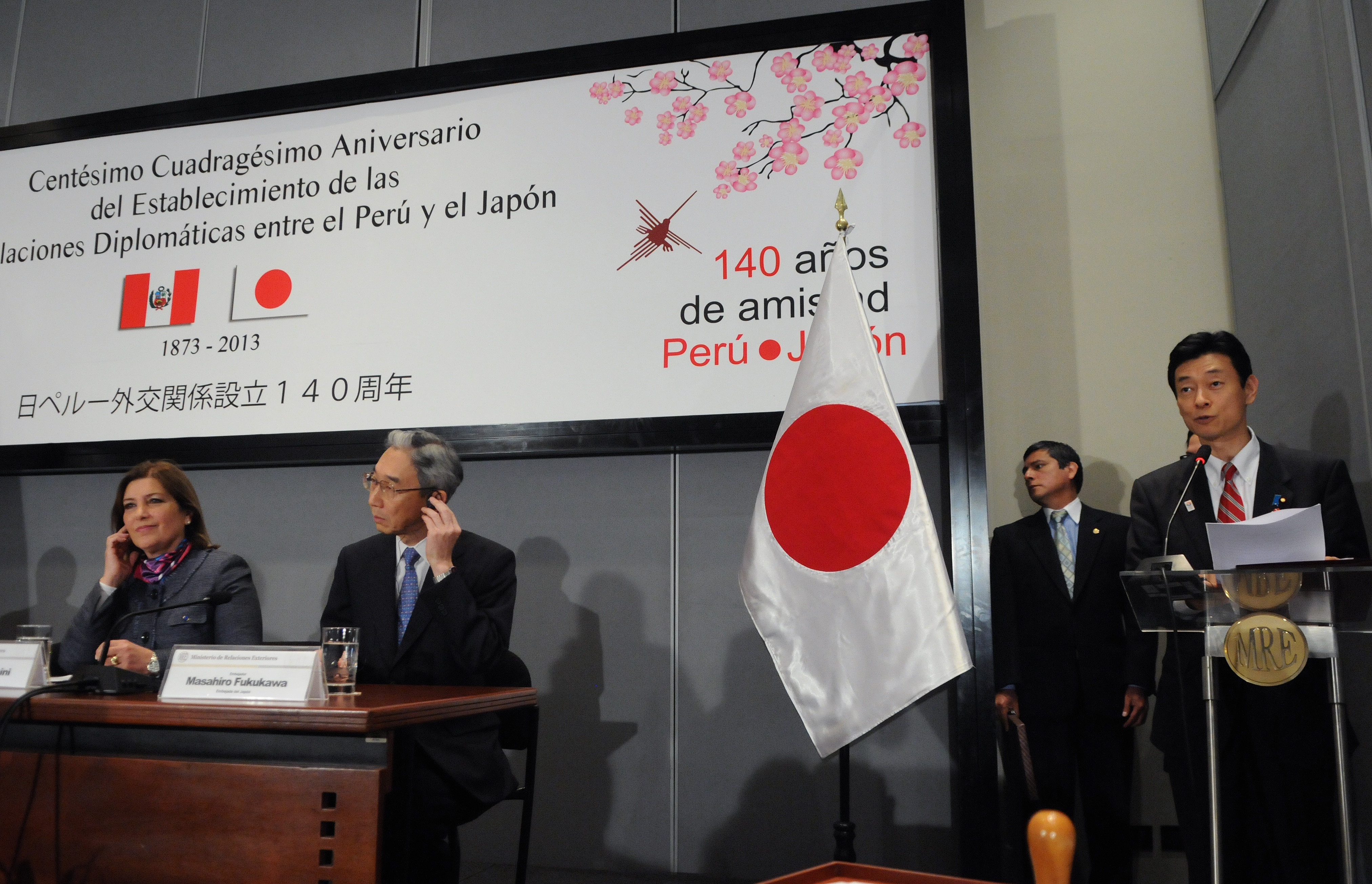 Como parte de las actividades para conmemorar el “Centésimo Cuadragésimo Aniversario del Establecimiento de las Relaciones Diplomáticas entre el Perú y el Japón”, la Ministra de Relaciones Exteriores, Eda Rivas Franchini, encabezó hoy, en la sede de la Cancillería, una ceremonia oficial que contó con la presencia del Diputado japonés Yasutoshi Nishimura, Enviado Especial del Primer Ministro Shinzo Abe; y del Embajador de Japón en el Perú, Masahiro Fukukawa, entre otras altas autoridades, empresarios japoneses y miembros de la comunidad nipona en nuestro país. Sigue leyendo la nota en nuestra Web: bit.ly/1bTKnyZ